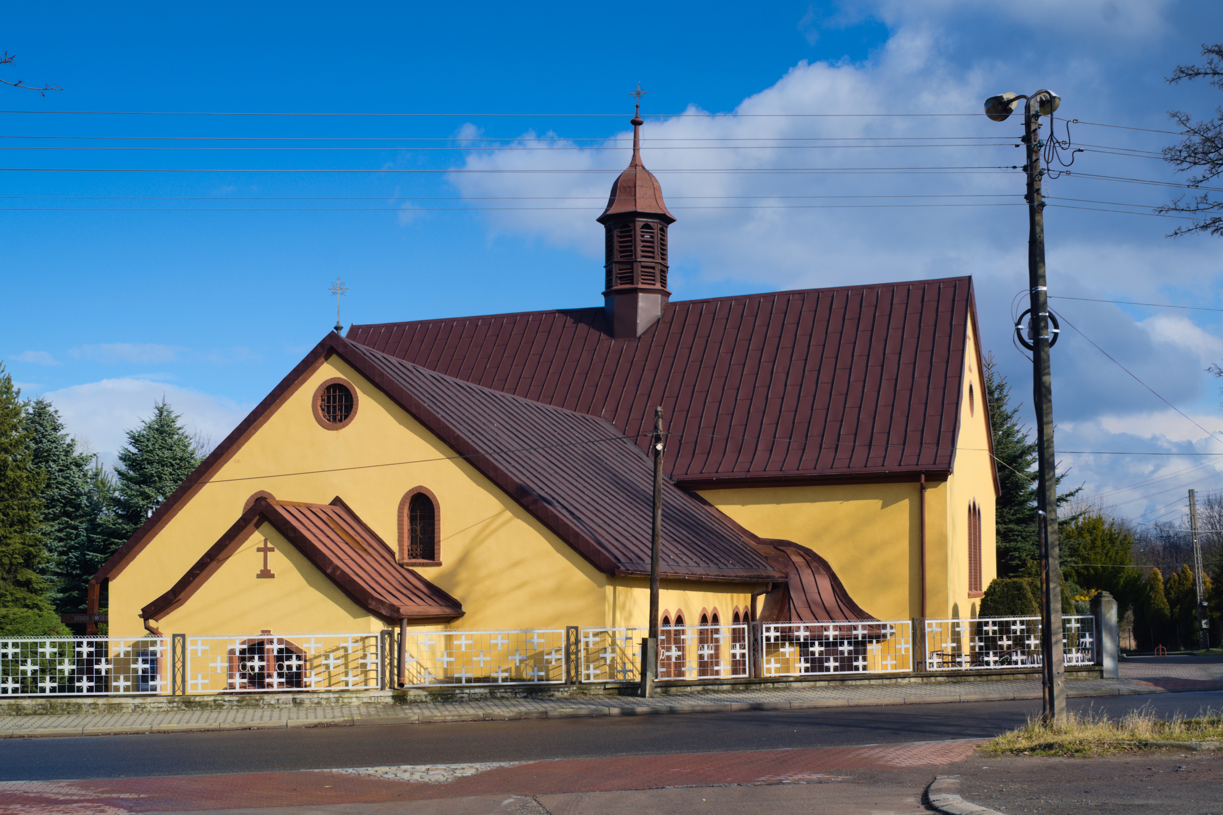 kościół św. Józefa w Gliwicach, Ligota Zabrska, ul. św. Józefa 1